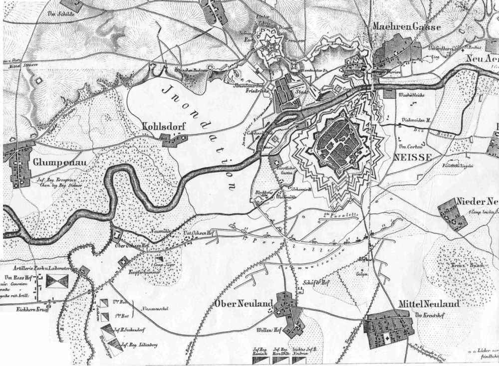 Plan Nysy (Neisse) z 1807